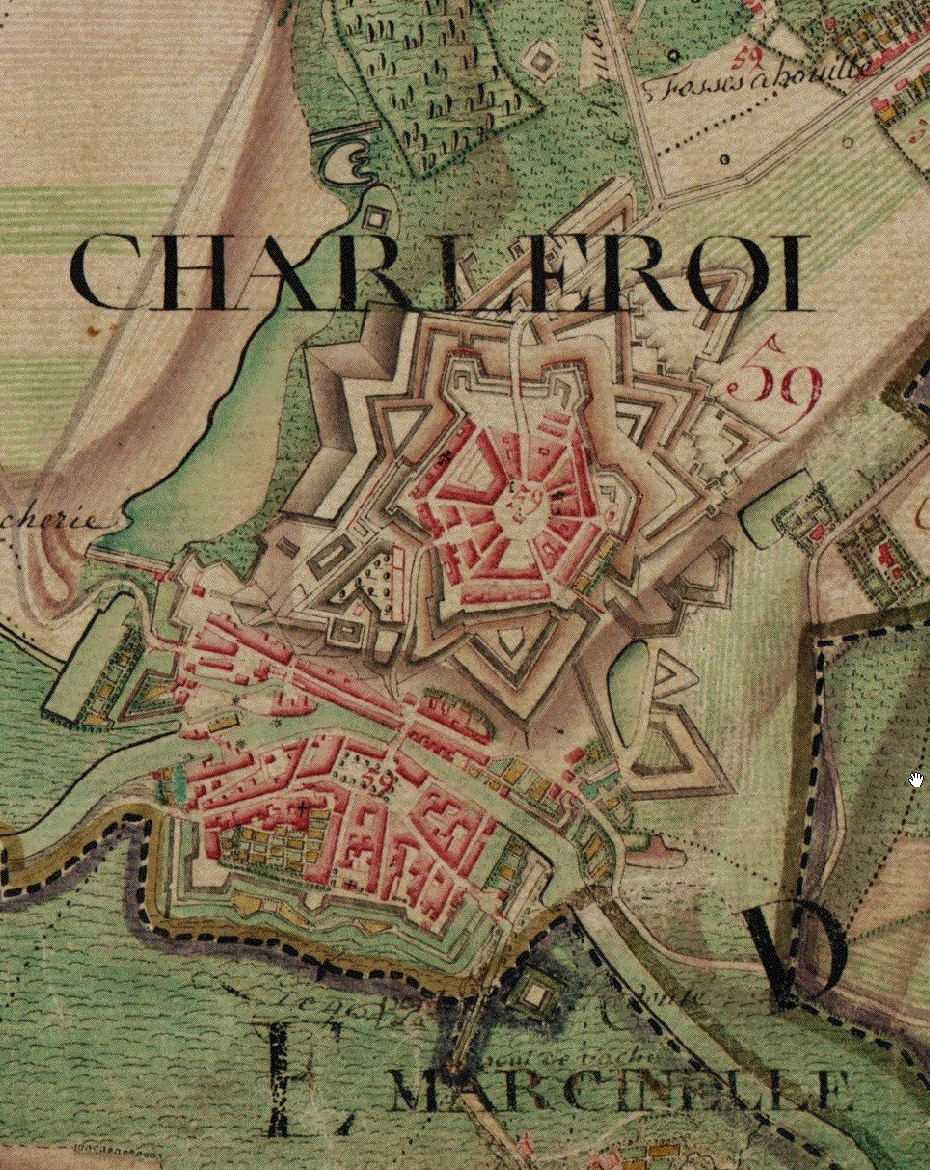 Charleroi. Carte de Cabinet des Pays-Bas autrichiens La carte de Cabinet des Pays-Bas autrichiens a été levée sous la direction du comte de Ferraris entre 1770 et 1777. Il s'agit d'un document militaire réalisé en trois exemplaires et dont l'échelle originale est 1 / 11 520. La carte est entièrement manuscrite et procède de levers sur le terrain.